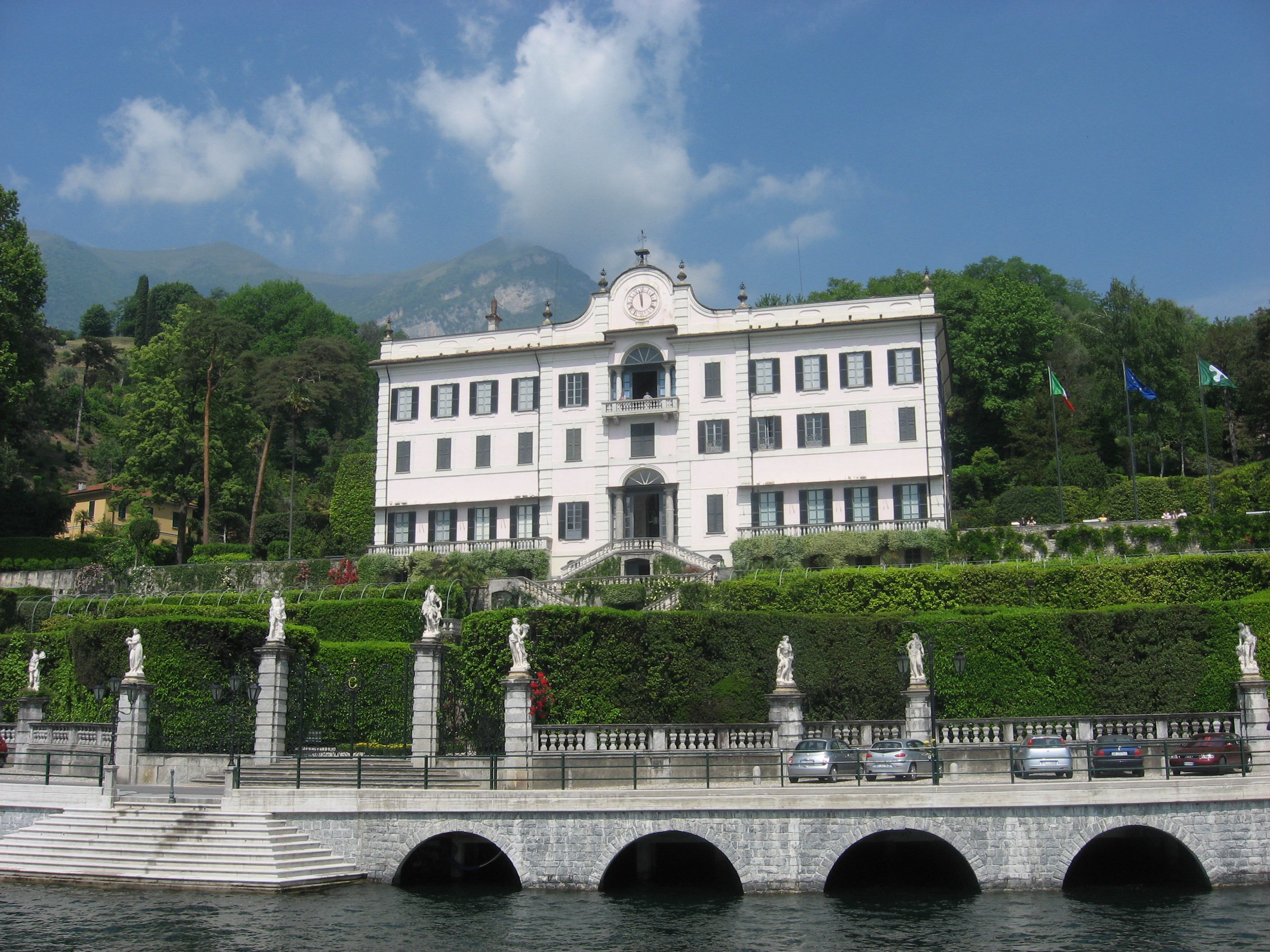 Villa Carlotta at Tremezzo, on Lake Como